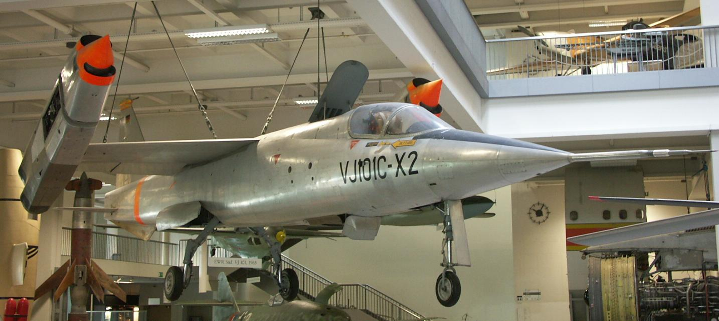 Deutsches Museum Munich Photo by Jean-Patrick Donzey